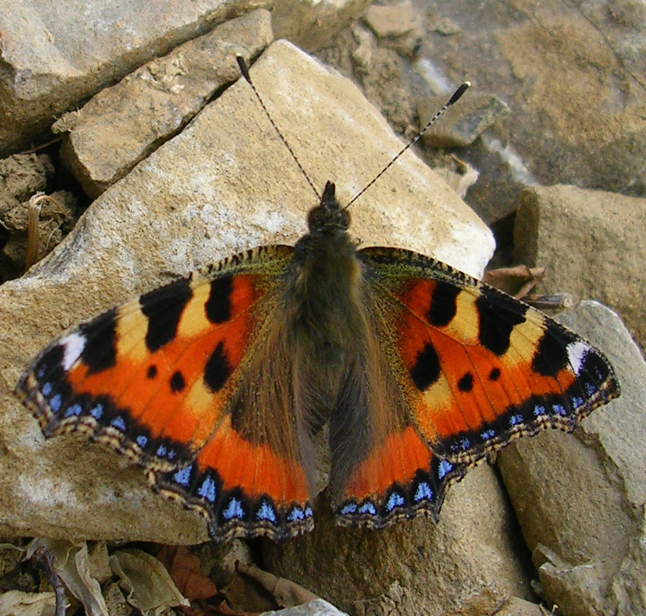 Aglais urticae (Kleiner Fuchs)Bellevue-Höhe Wien